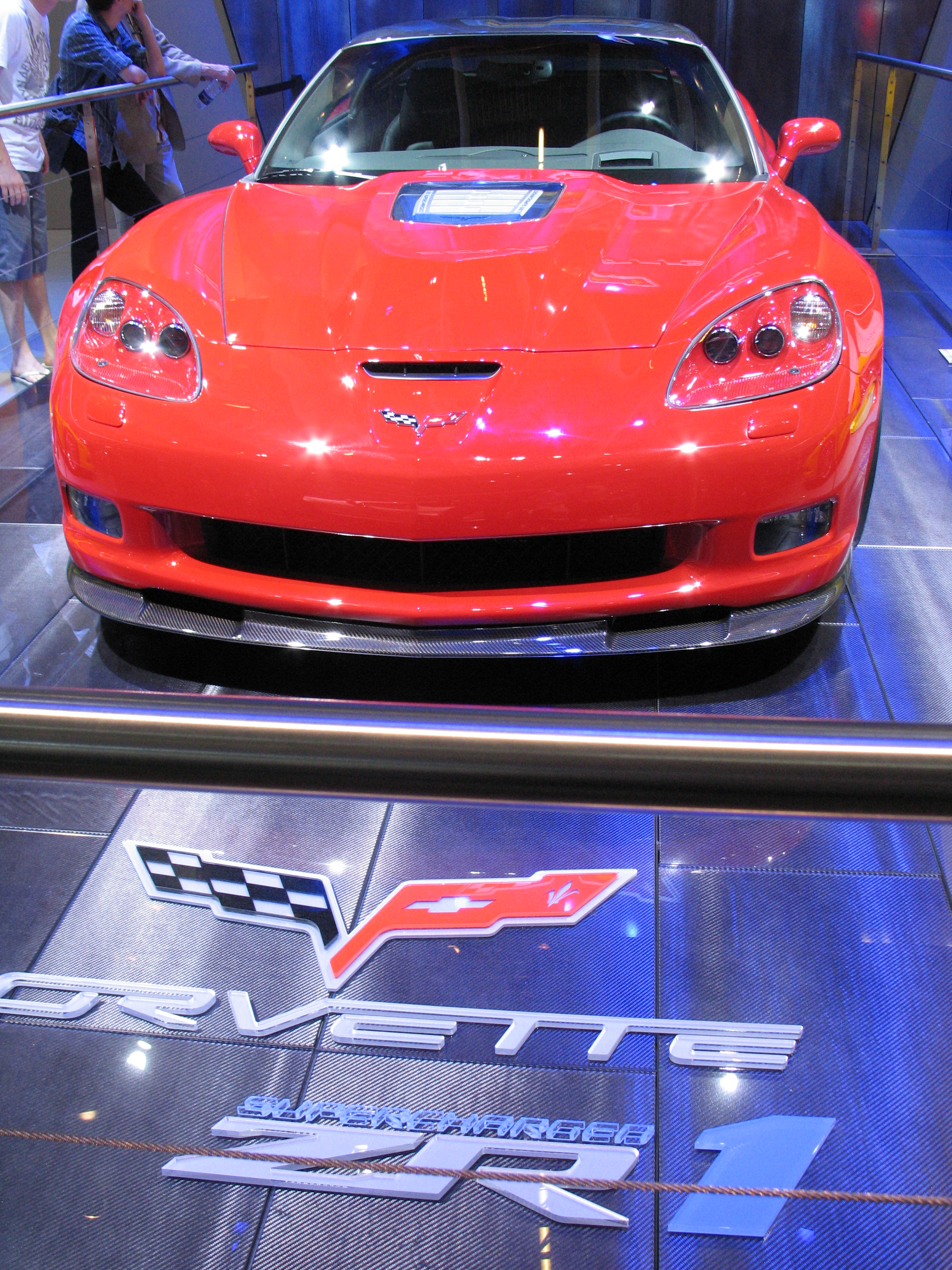 Corvette ZR-1